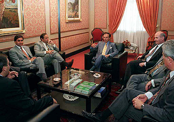 El presidente Menem recibió a los gobernadores del Nuevo Cuyo, conformado por las provincias de La Rioja, San Juan, Mendoza y San Luis, quienes le expresaron su apoyo al modelo puesto en marcha por el Gobierno nacional, y se mostraron dispuestos a defender a la actual gestión justicialista que encabeza el jefe del Estado.